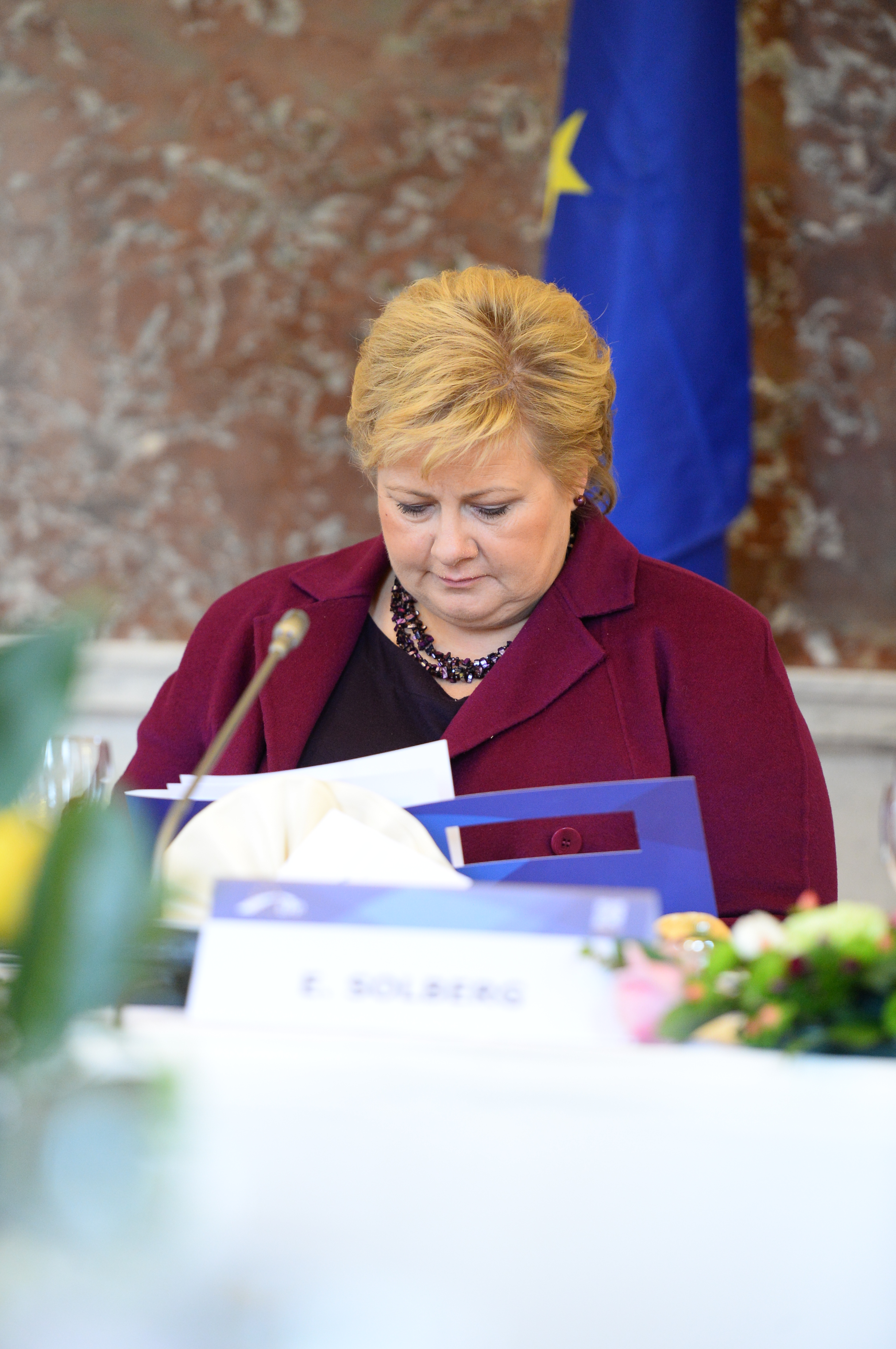 EPP Summit, March 2015, Brussels